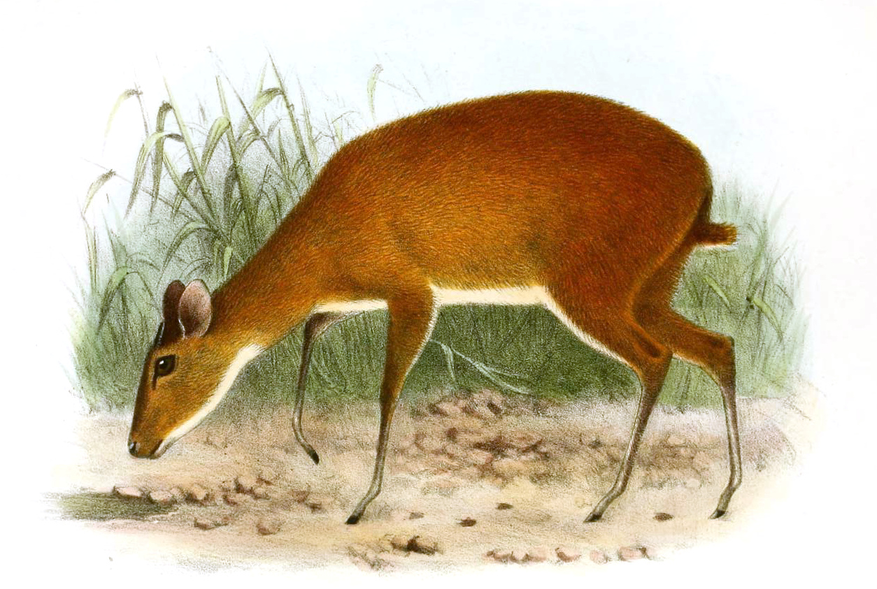 Neotragus batesi